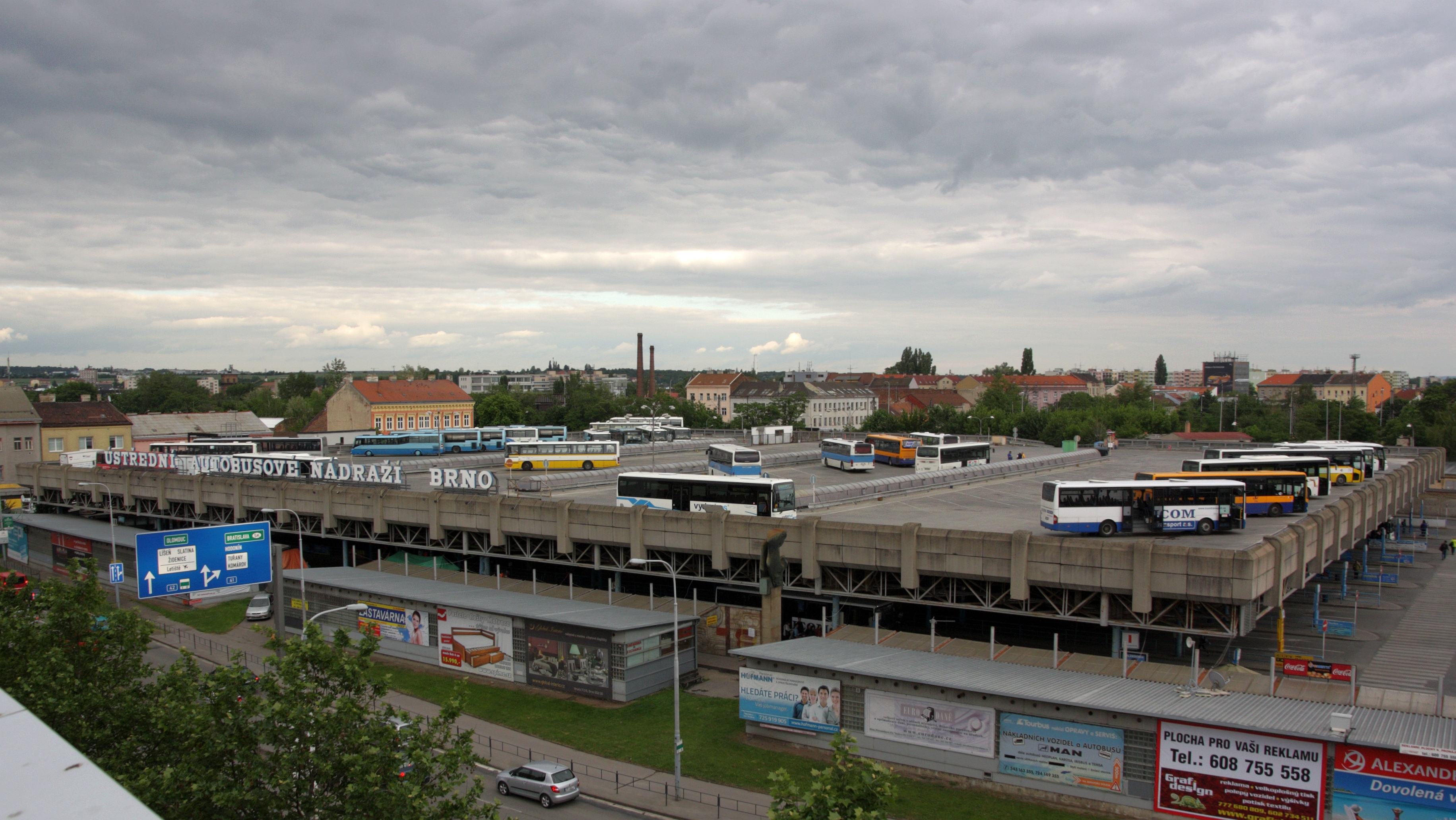 Ústřední autobusové nádraží Brno. Pohled ze střechy Vaňkovky.